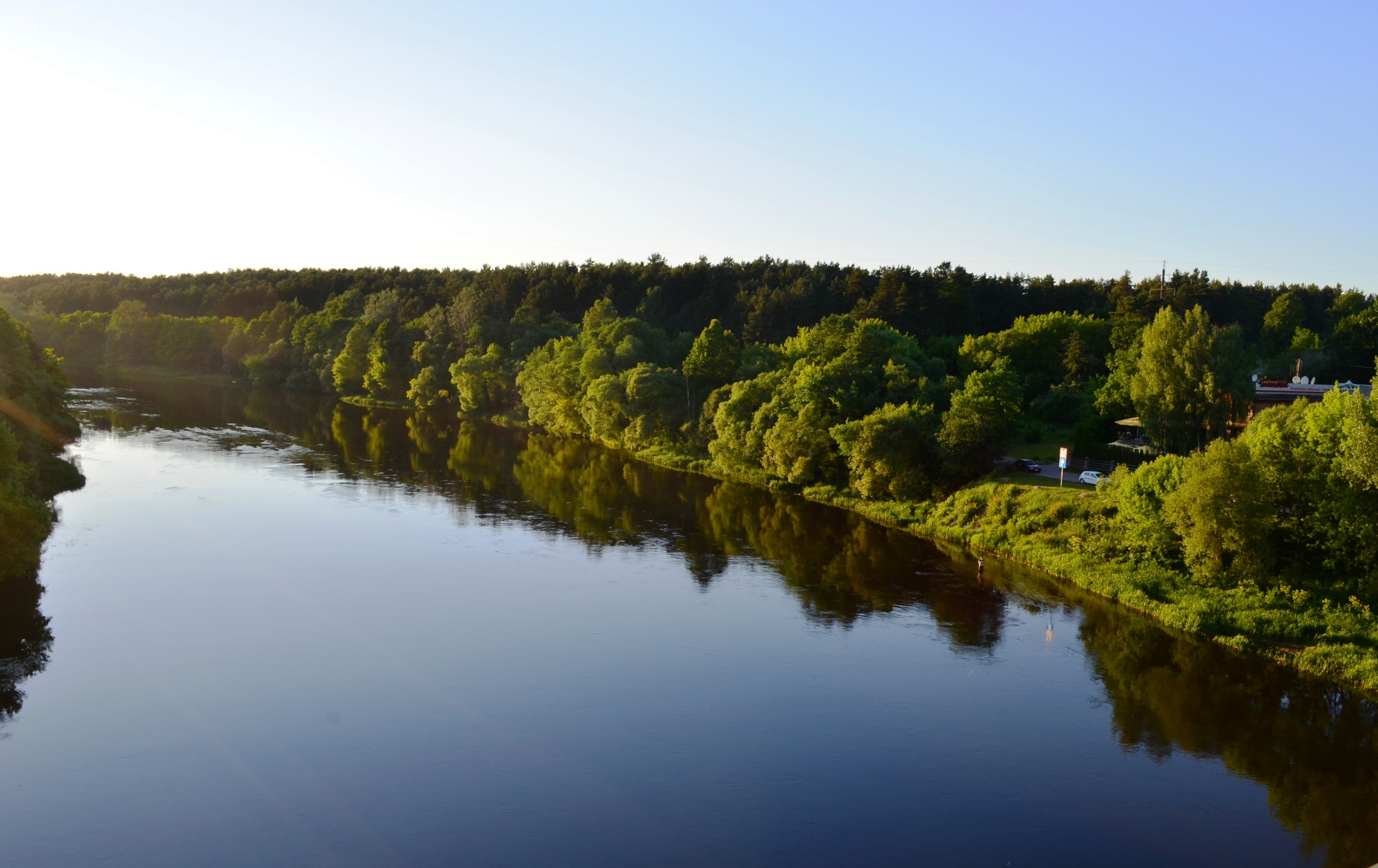 Neris nuo Valakampių tilto, Vilnius